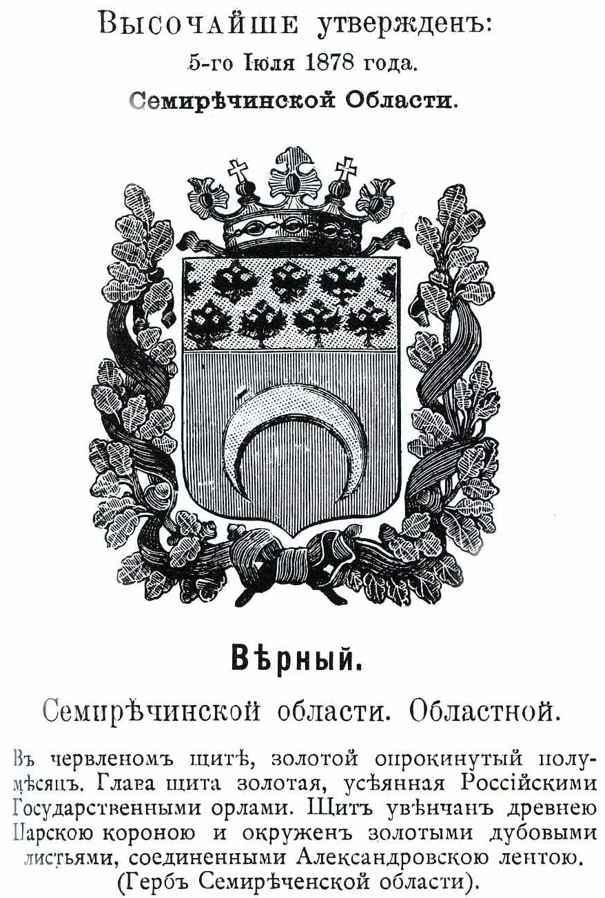 Official Russian Empire coat of arms Verny town (now Alma-Ata). Герб Российской Империи областного города Верный Семиреченской области с официальным описанием в Гербовнике Винклера.